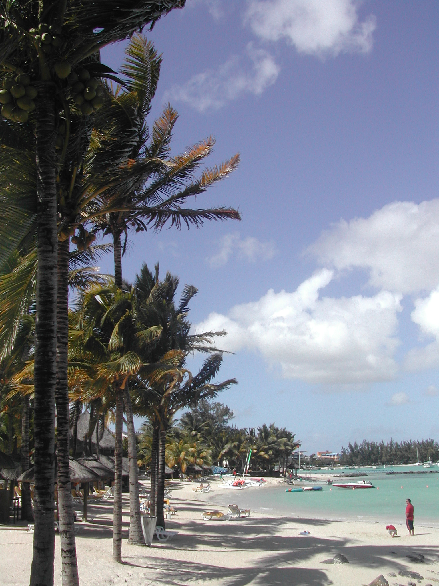 Photo de la plage de Grand Baie à Maurice, dans le nord de l'île.